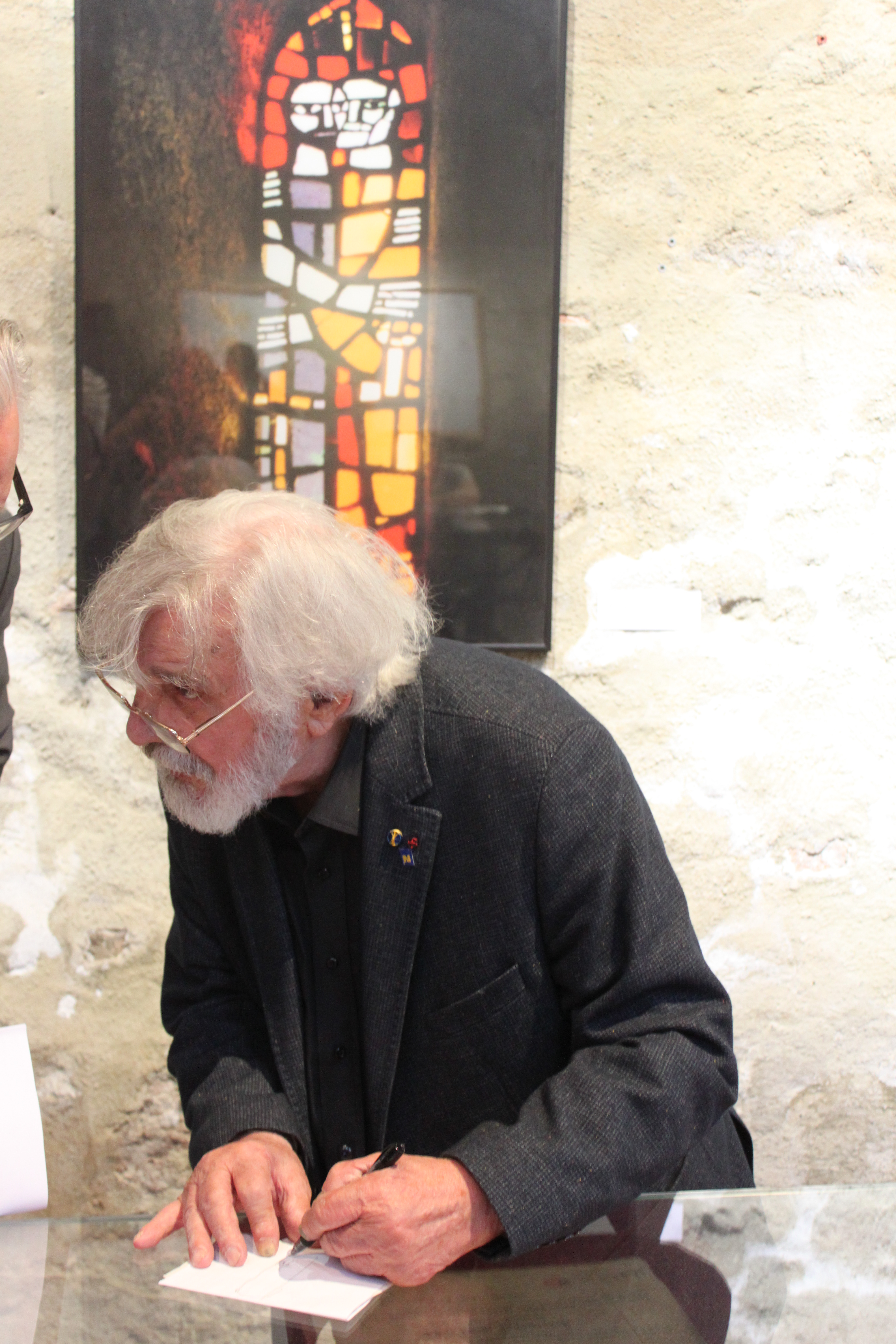 Florian Jakowitsch erklärt in St. Peter an der Sperr die Arbeit am Betonglasfenster mit Papier und Stift, im Bildhintergrund Darstellung zum Betonglasfenster Pierre/Paul in La Motte-Chalancon in Frankreich 1962